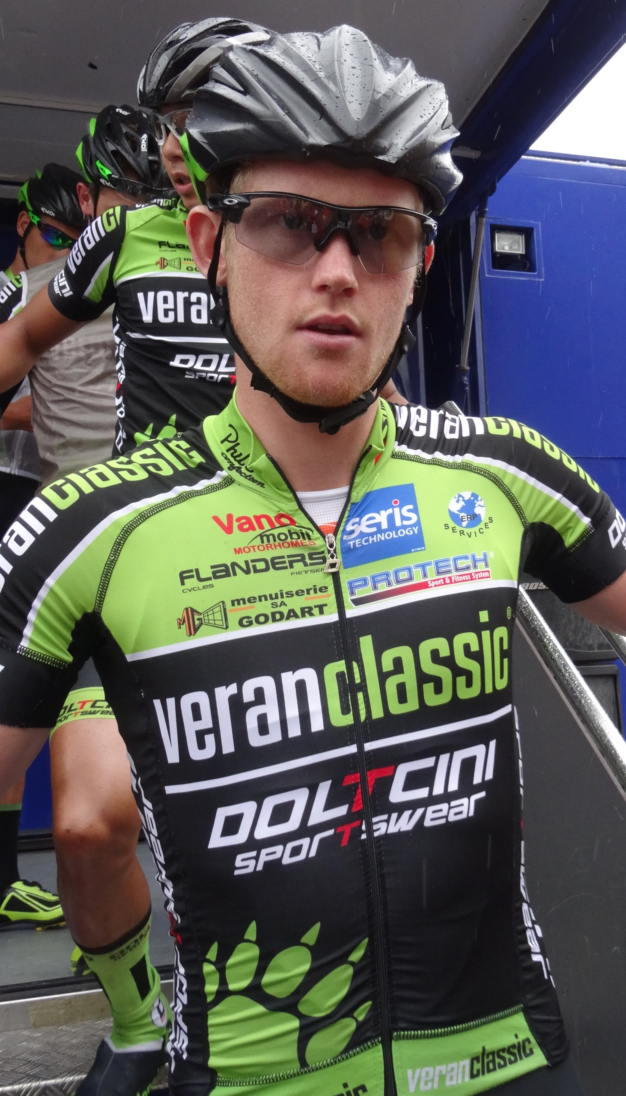 Reportage photographique réalisé le dimanche 13 juillet à l'occasion du départ et de l'arrivée de la Ronde pévéloise 2014 à Pont-à-Marcq, Nord-Pas-de-Calais, France.